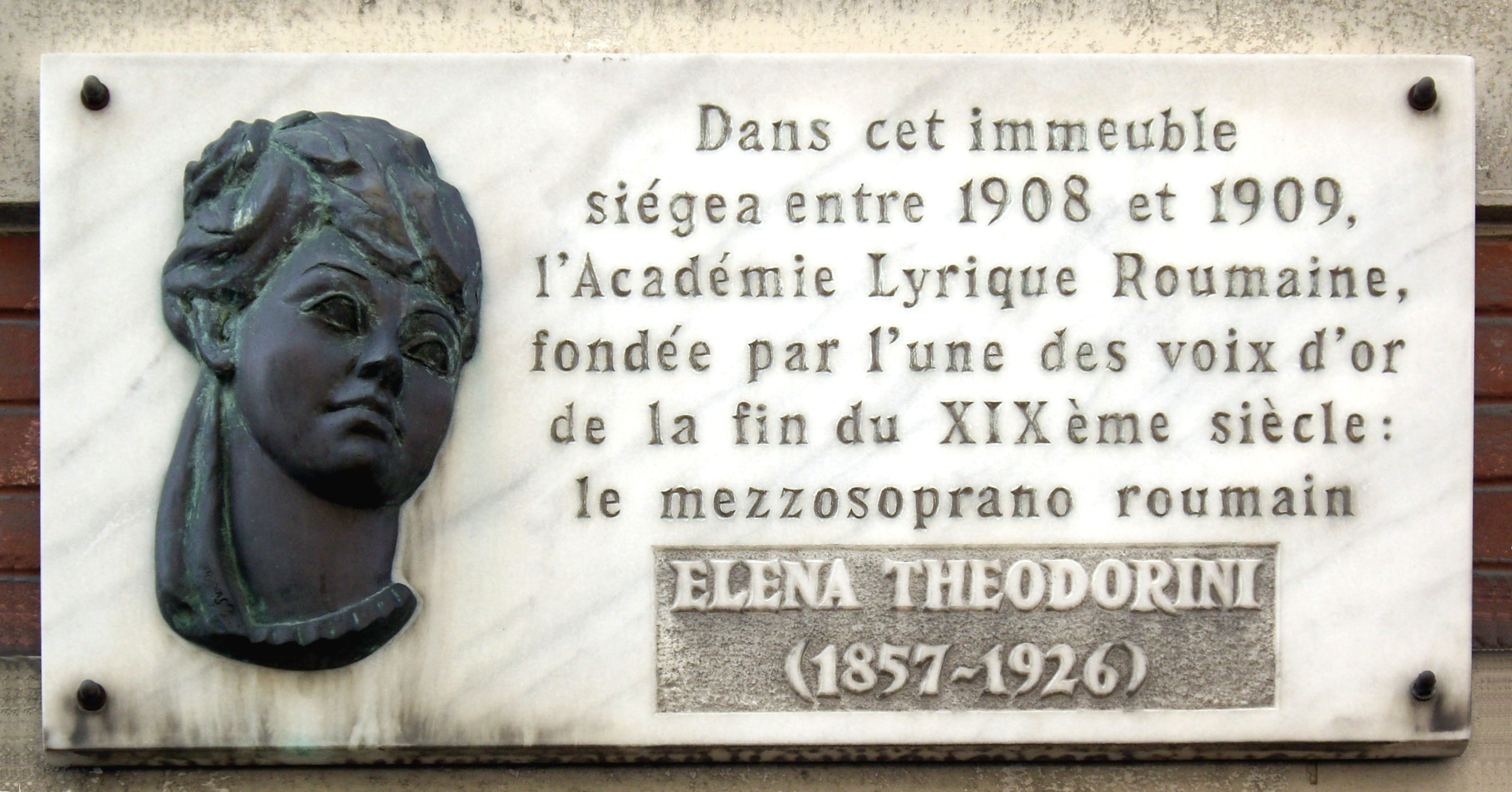 Plaque apposée au n° 25 de la rue de Tocqueville, Paris 17e, où siégea entre 1908 et 1909 l'Académie lyrique roumaine fondée par la chanteuse d'opéra Elena Teodorini (1857-1926).